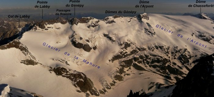 Sommets du Génépy